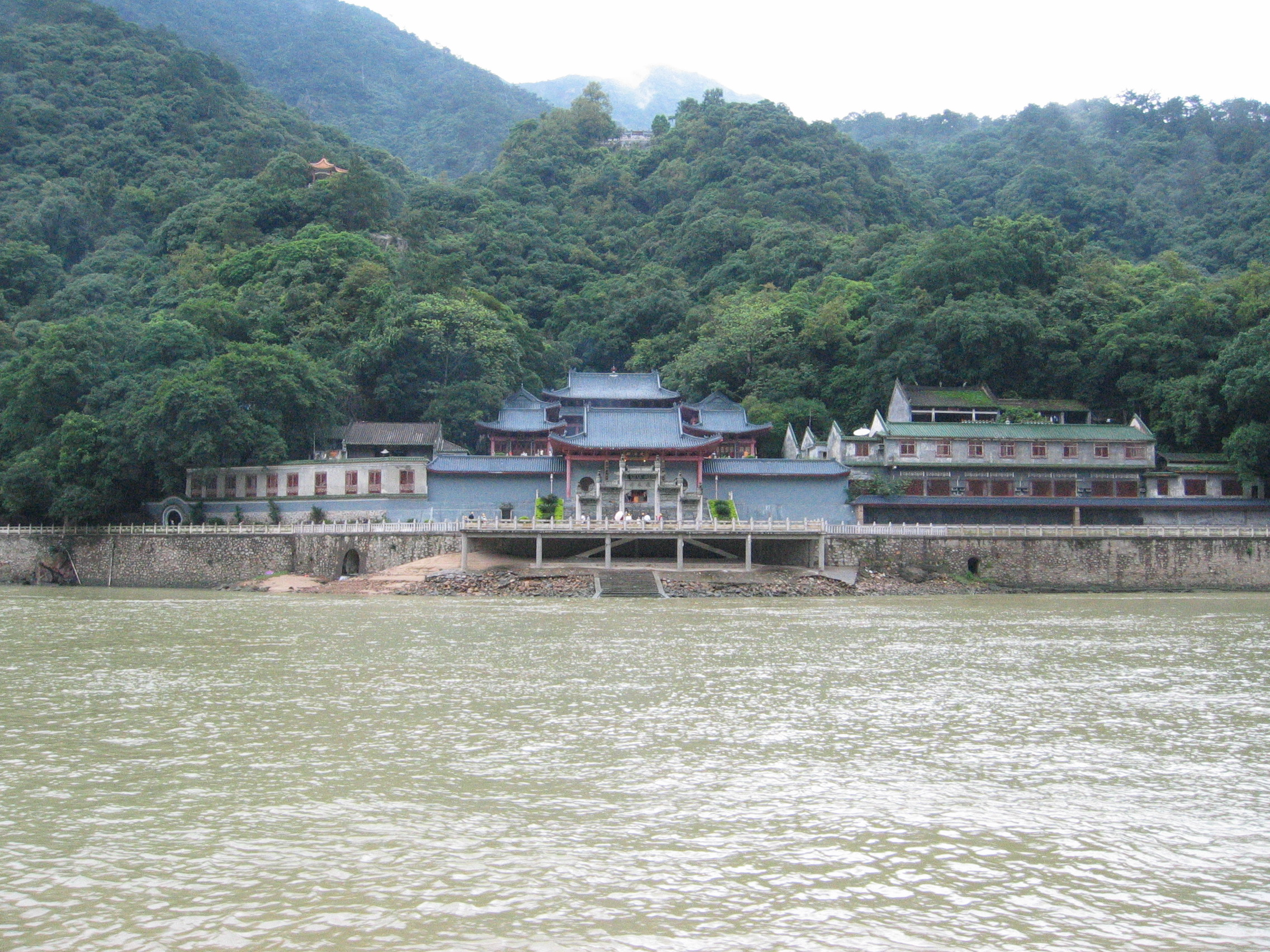 Feilai Temple, Qingyuan, Guangdong, China